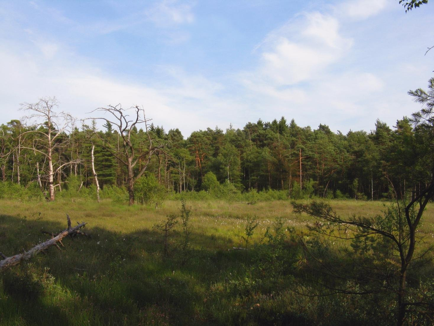 Das Hiddeser Bent im Sommer; Naturschutzgebiet „Donoperteich–Hiddeser Bent“ in Detmold